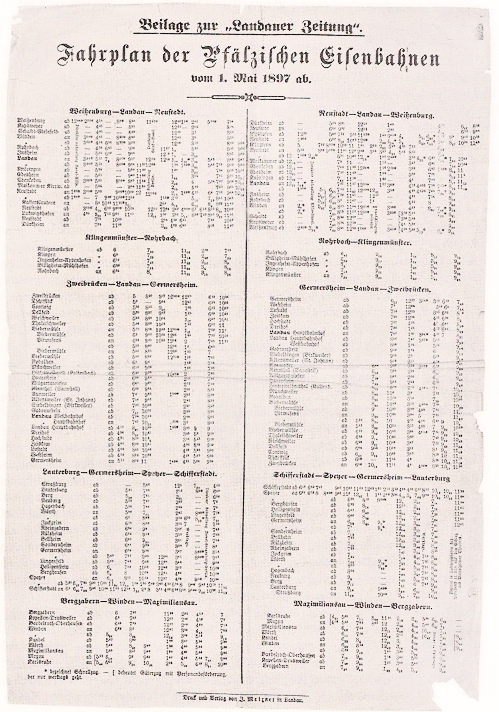 Beilage zum Landauer Anzeiger. Fahrplan der Pfälzischen Eisenbahnen vom 1. Mai 1897 ab.